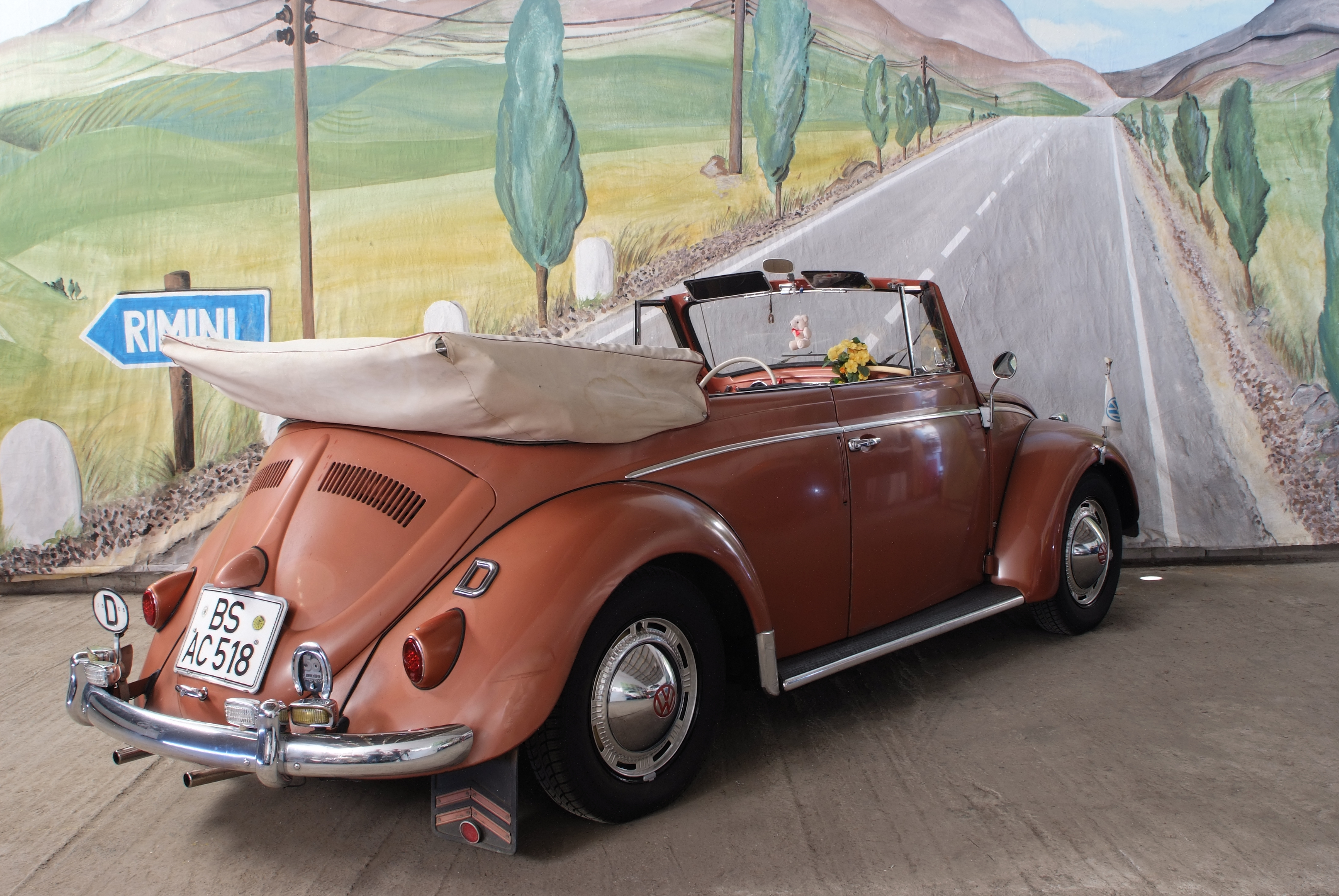 VW Käfer Karmann-Cabriolet, Baujahr 1956, Typ 1/15